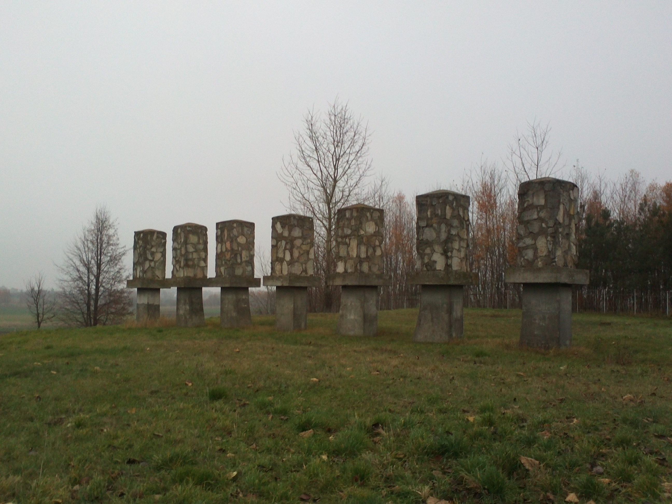 Pomnik cmentarza żydowskiego.